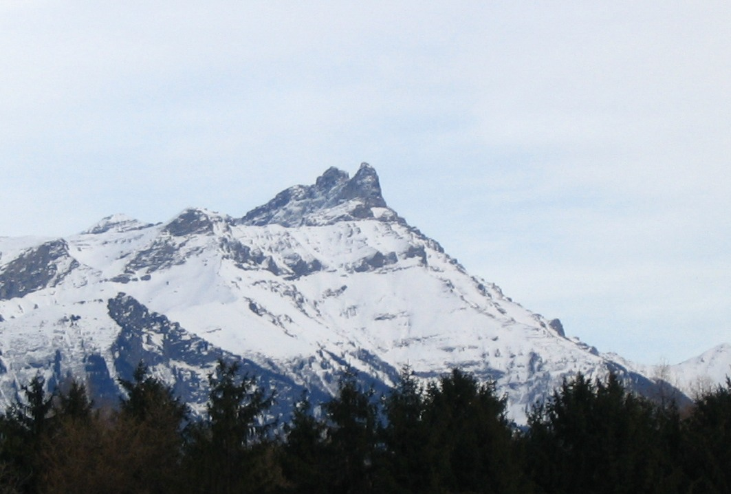 Dents de Morcles (Switzerland)